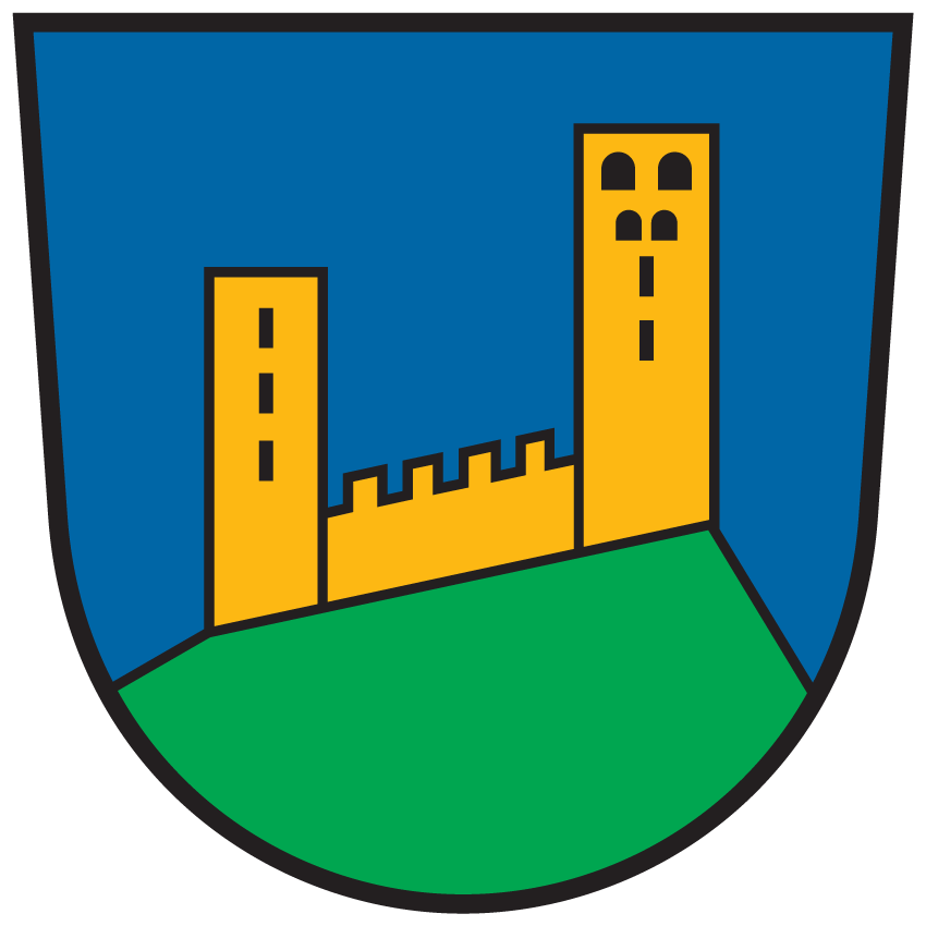 Wappen von Liebenfels